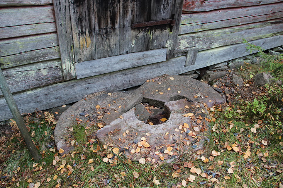 Tre halva kvarnstenar som trappsteg till skvaltkvarn i byn Jägra i Malung. Kvarnstenarna är tillverkade i Malung.